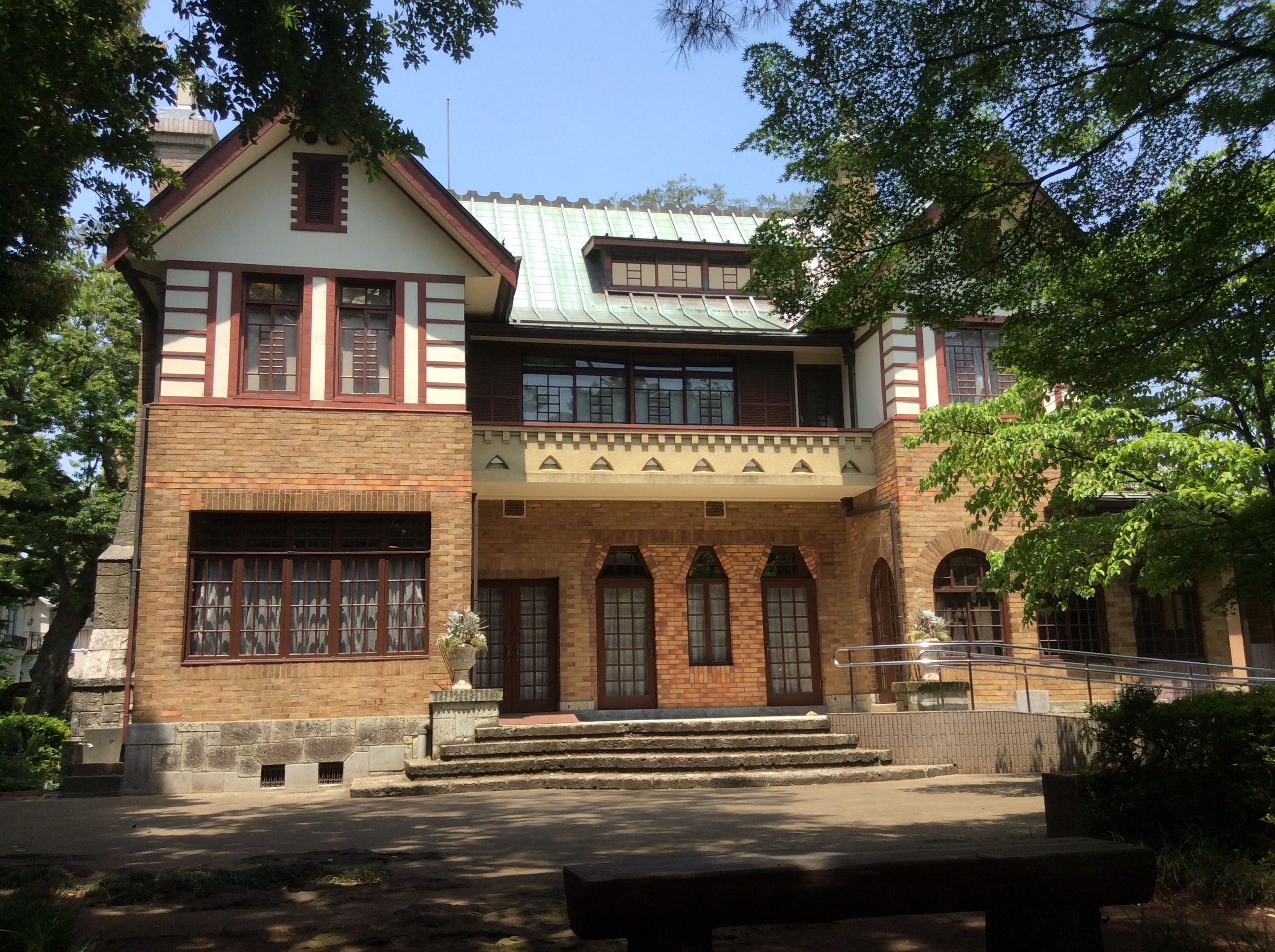 （2015年5月15日撮影）